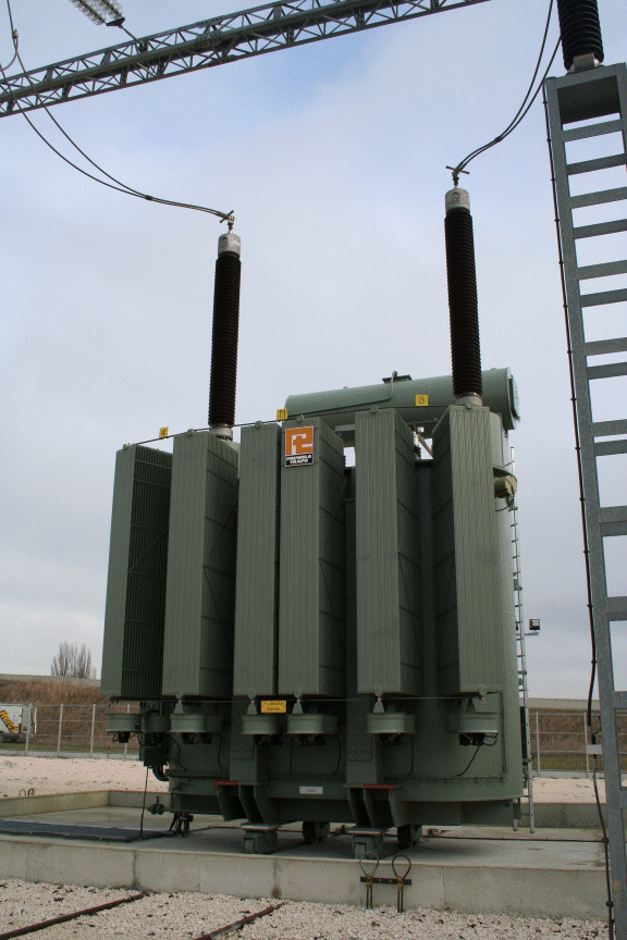 Een Pauwels 400kV spoorwegtransformator voor de Franse hogesnelheidstrein nabij Parijs. De transformator wordt tweefasig gevoed van het 400kV net. De secundaire heeft een geaarde middenaftakking die verbonden wordt met de spoorlijnen. De secundaire wikkeling geeft voeding aan een bovenleiding en aan een ondergrondse kabel in tegenfase.